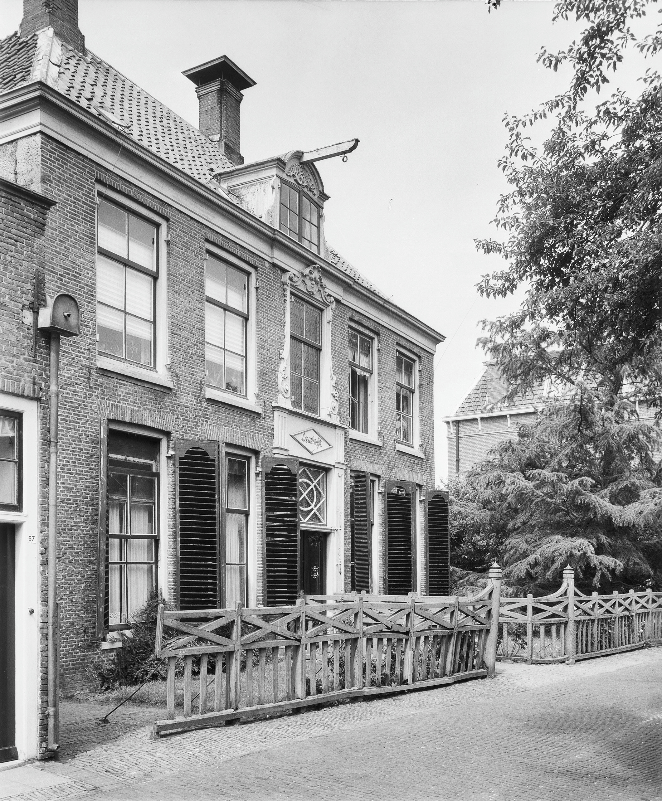 Huis Leeuwendijk: Leeuwendijk" ( oost-zijde )